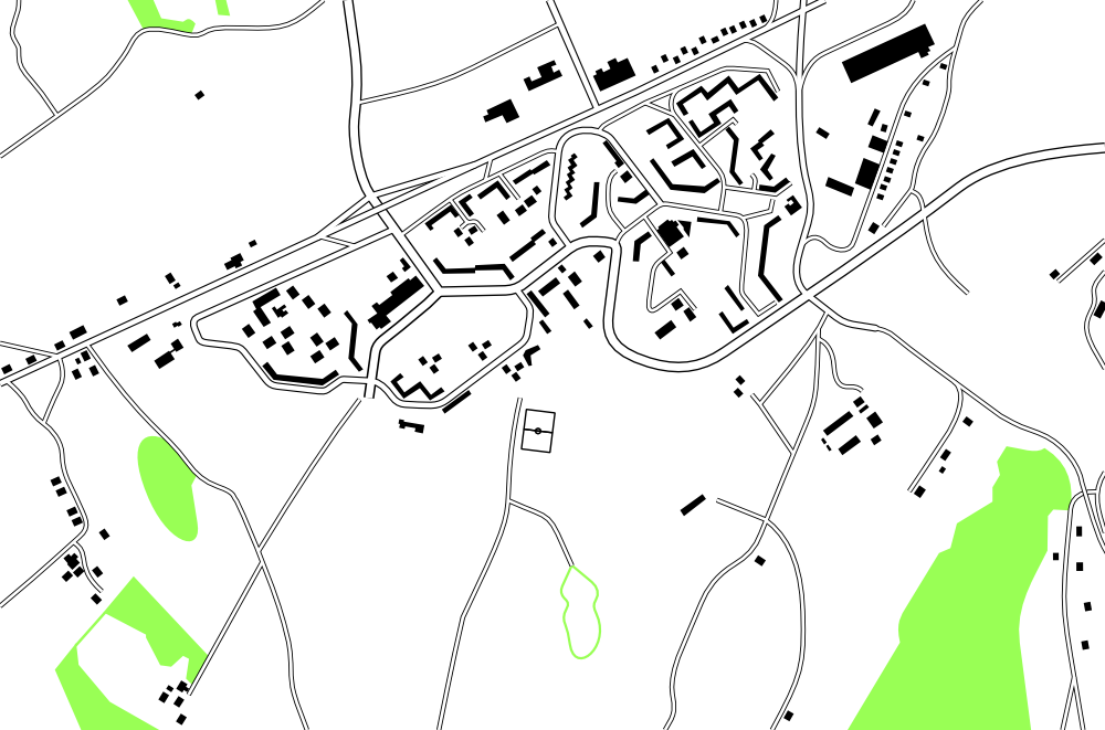 Plan du quartier de Planoise à Besançon réalisé à partir des cadastres de 1875.